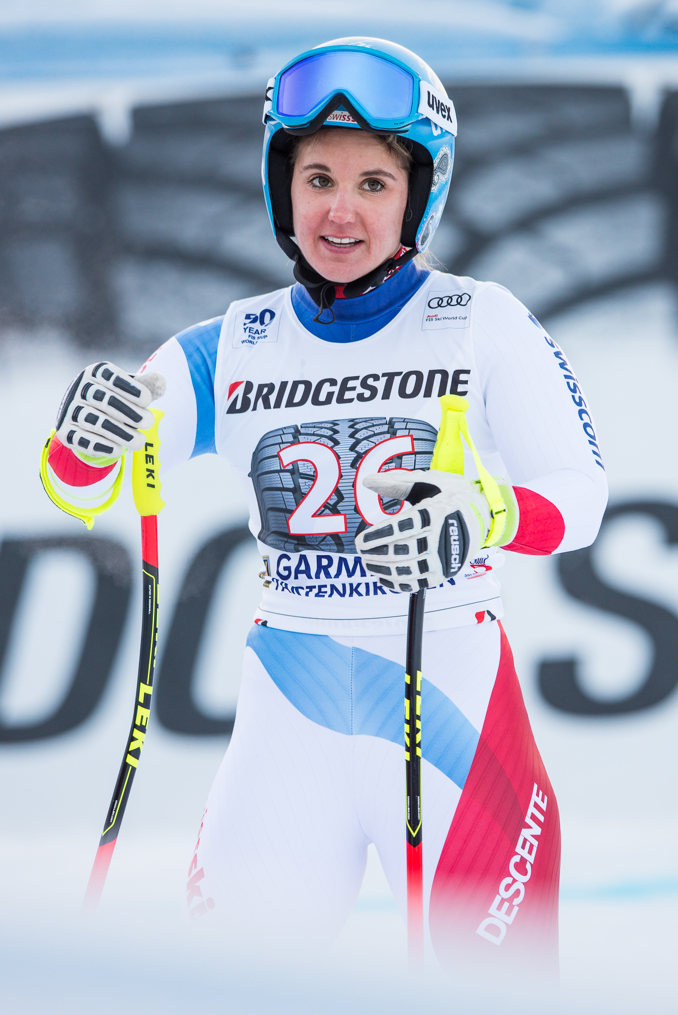 64. Kandahar Rennen,Audi FIS Ski Weltcup Garmisch-Partenkirchen,Damen Abfahrt,Joana Hählen,Kandahar,Ladies Downhill